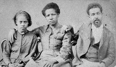 Azevedo, Militão Augusto de Família (anônima) , ca. 1870 albúmen Acervo do Museu Paulista (São Paulo, SP)